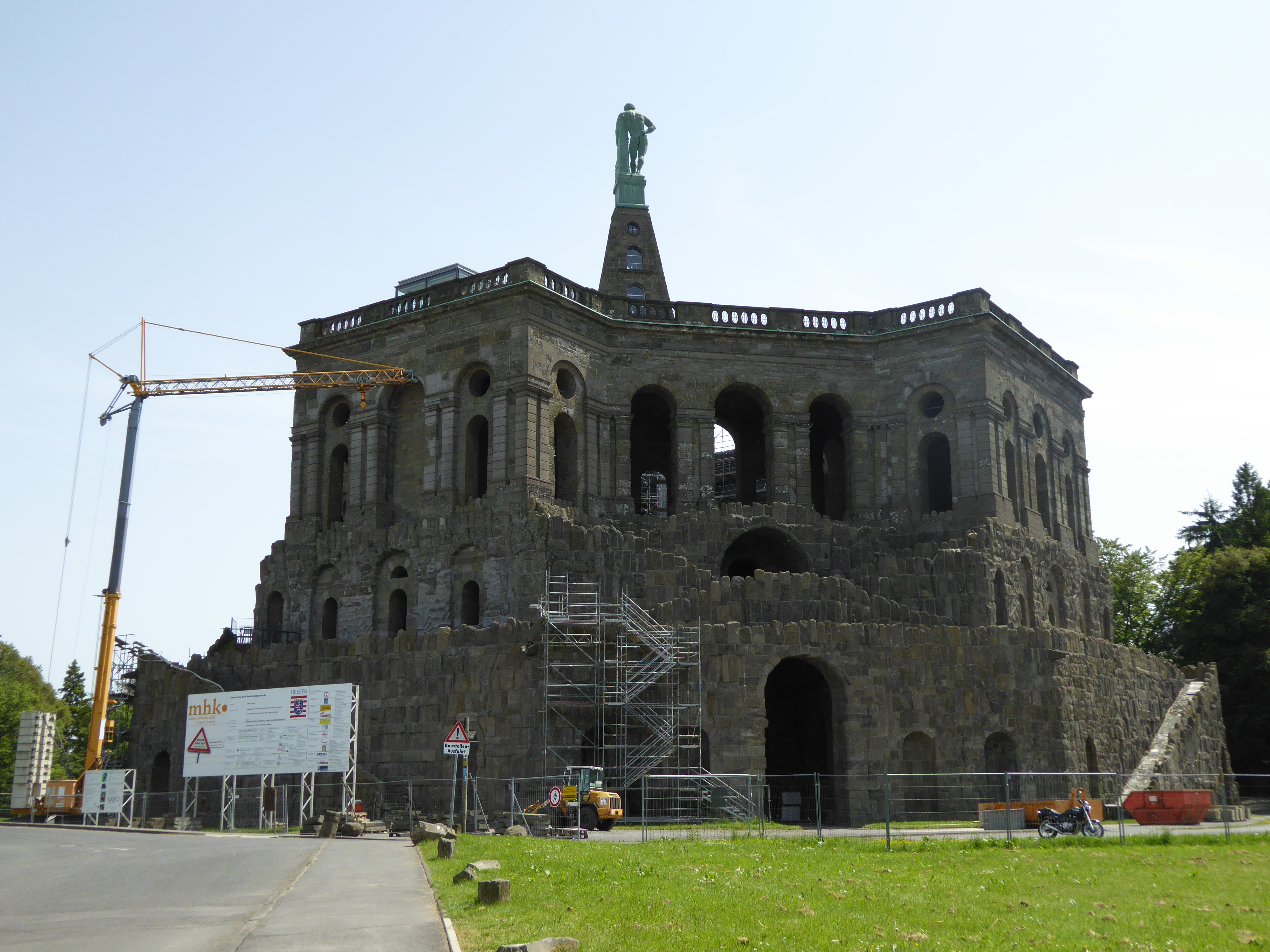 Hercules im Bergpark Wilhelmshöhe in Kassel